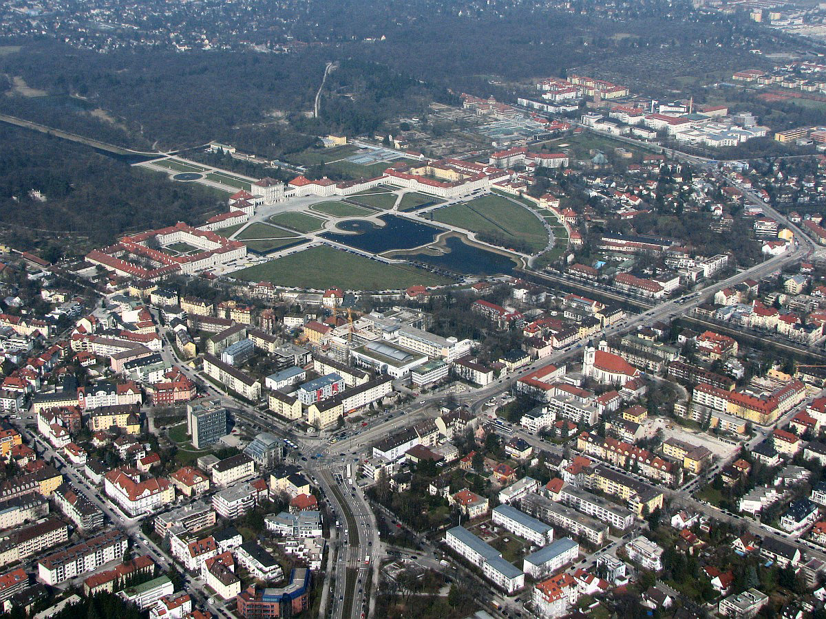 Luftbild München Stadtteil Nymphenburg Arnurlfstr Notburgastr Krankenhaus Barmherzige Brüder Dritter Orden Schloss Nymphenburg Park Foto 2009 Wolfgang Pehlemann Wiesbaden IMG_1348